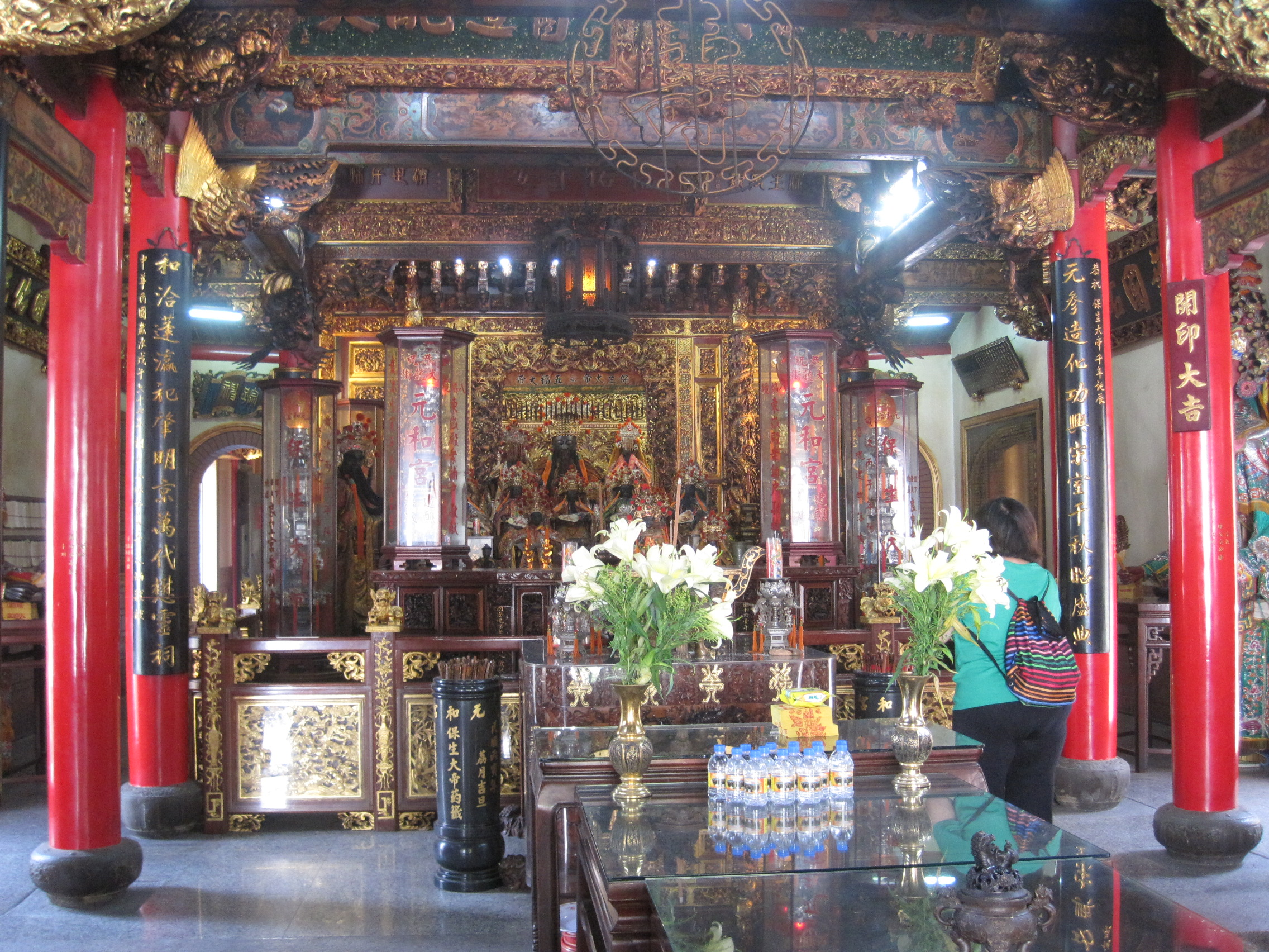 臺南元和宮白龍庵正殿